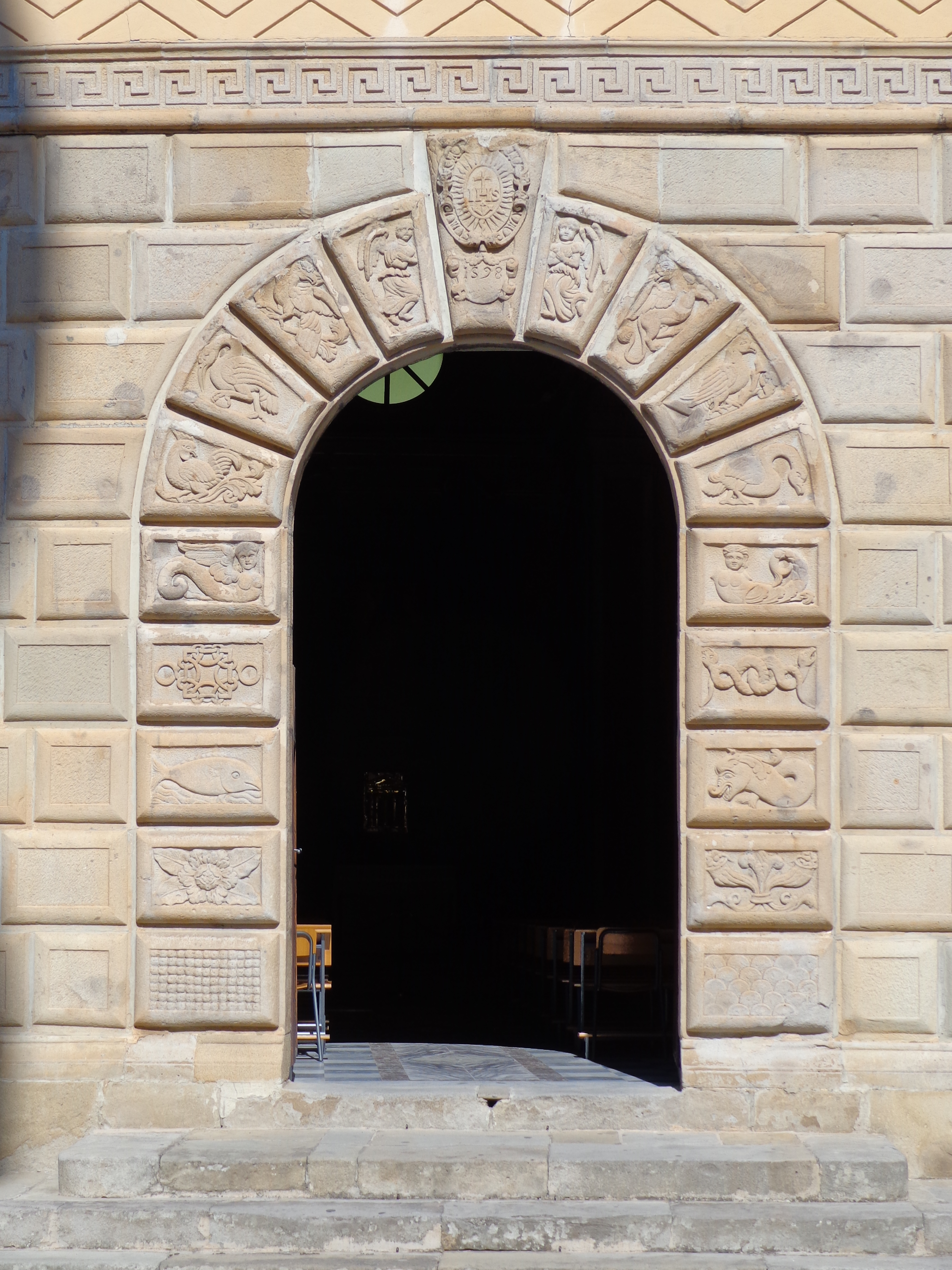 Portale santuario antico